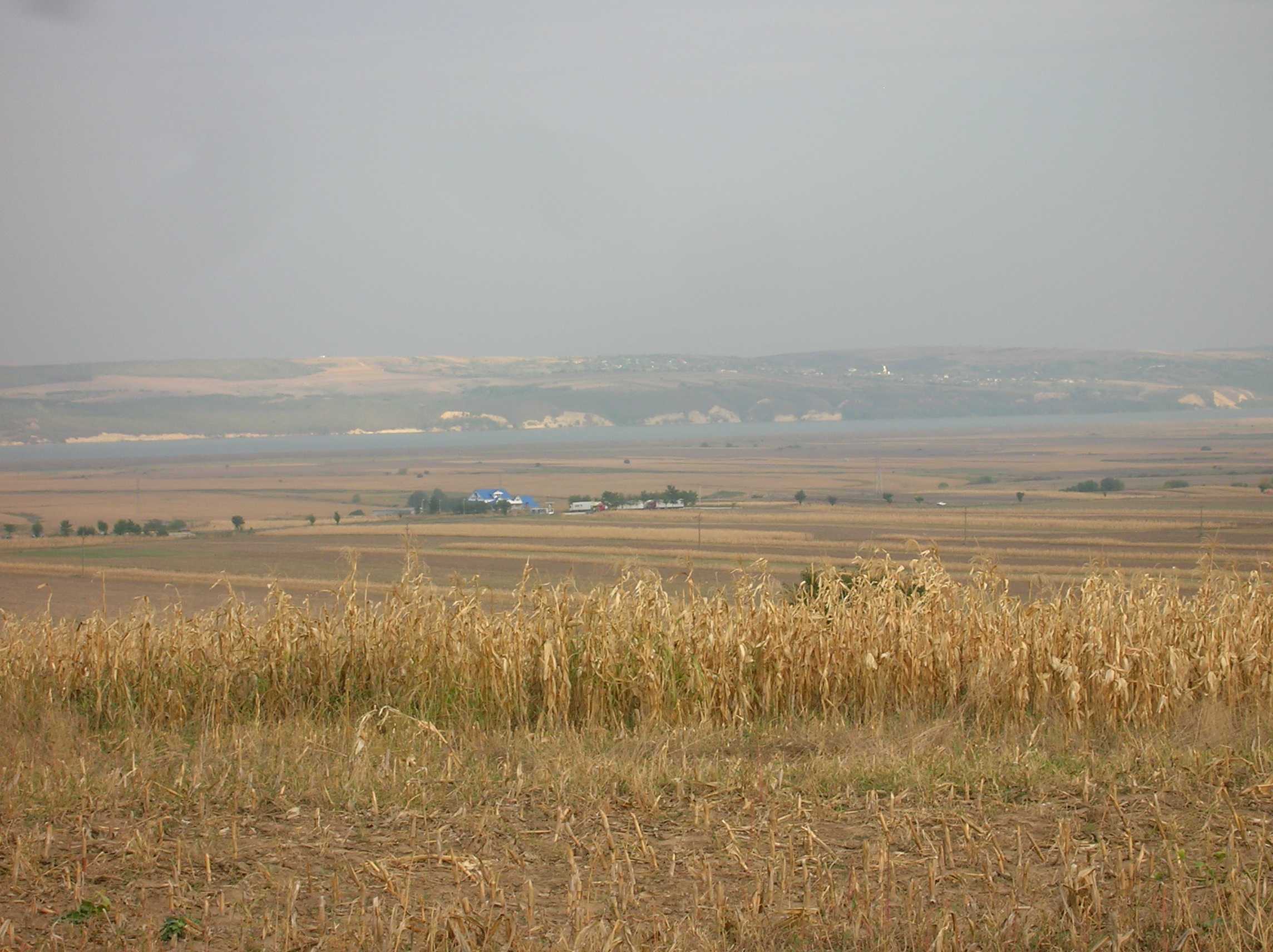 Comuna Valea Seacă Bacău - Satul Mândrişca - Spre DN2 şi Lacul Bereşti de pe dealul Bisericii Sfântul Ierarh Nicolae